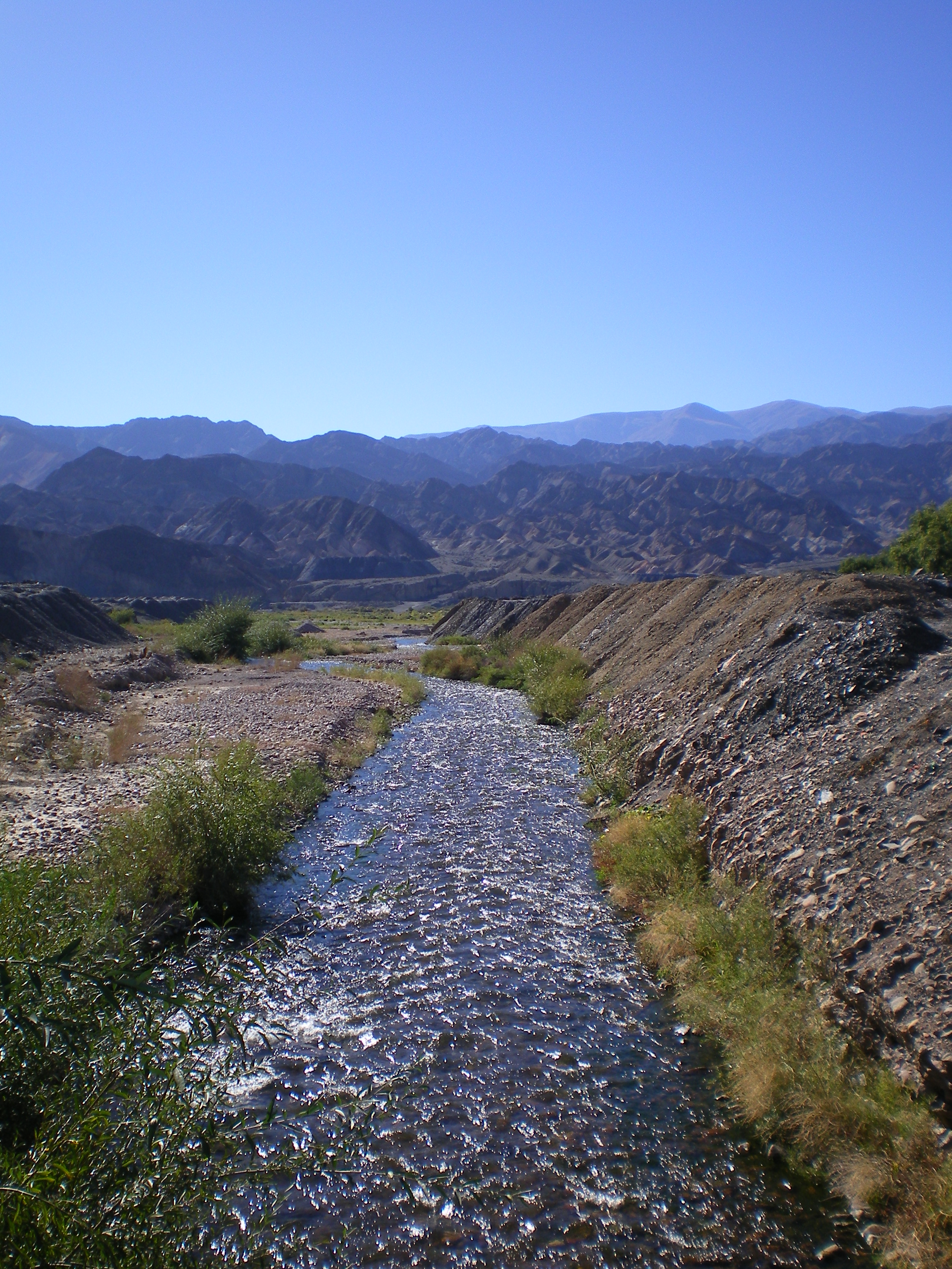 Río Calingasta, departamento Calingasta, provincia de San Juan, Argentina